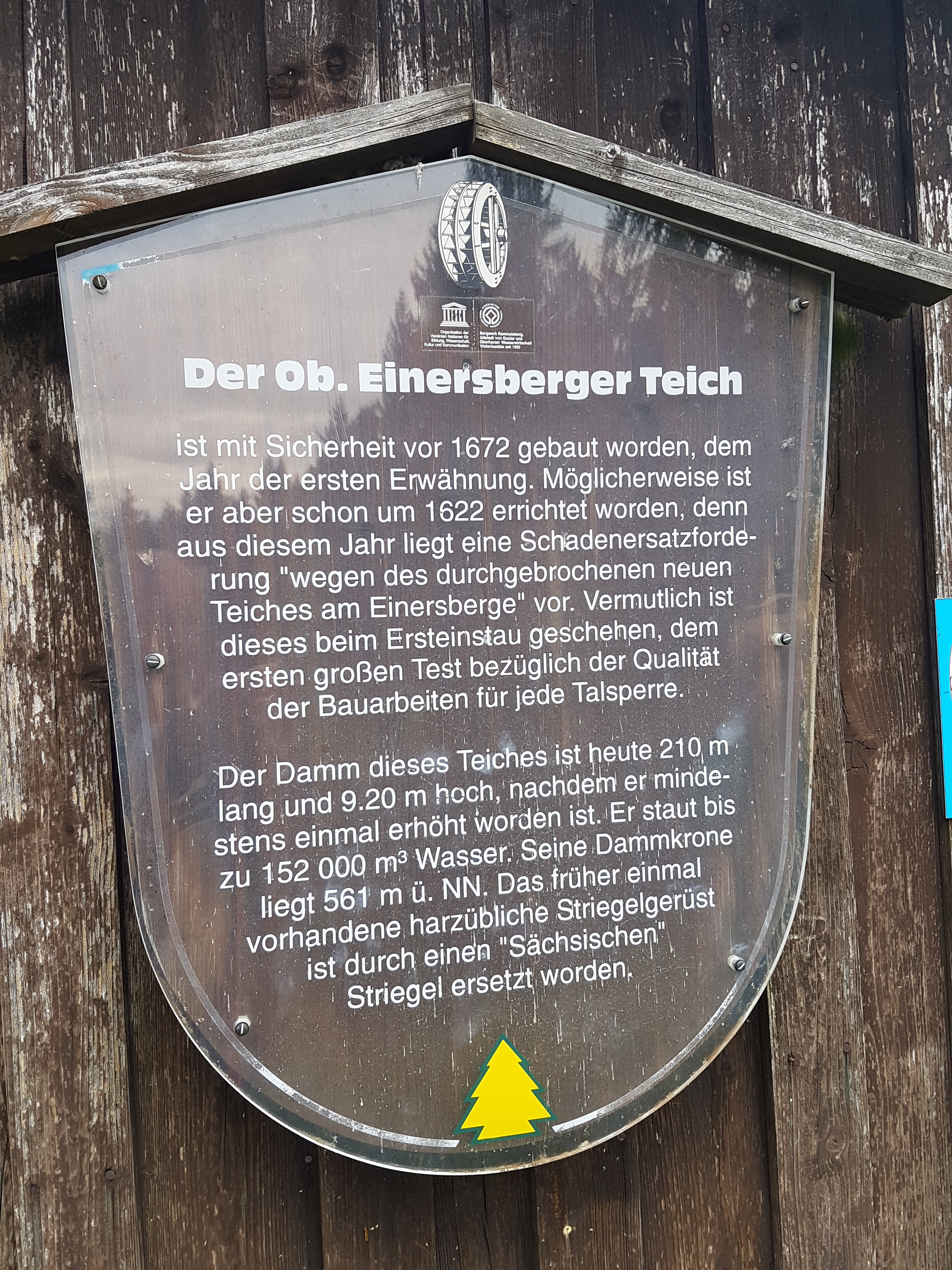 04.1-Infotafel, Oberer Einersberger Teich, 26-05-2019